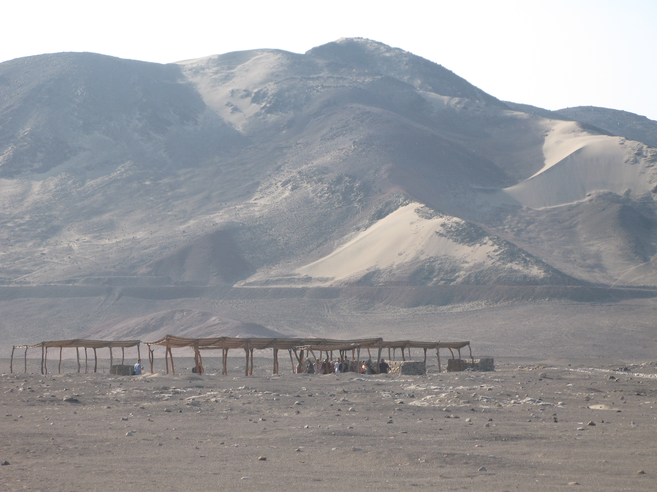 Arheološko nahajališče Chauchilla - Nazca ljudstvo